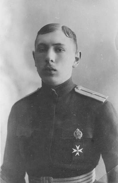 Arseni Jefimov (Efimoff), Eesti sõjaväelane